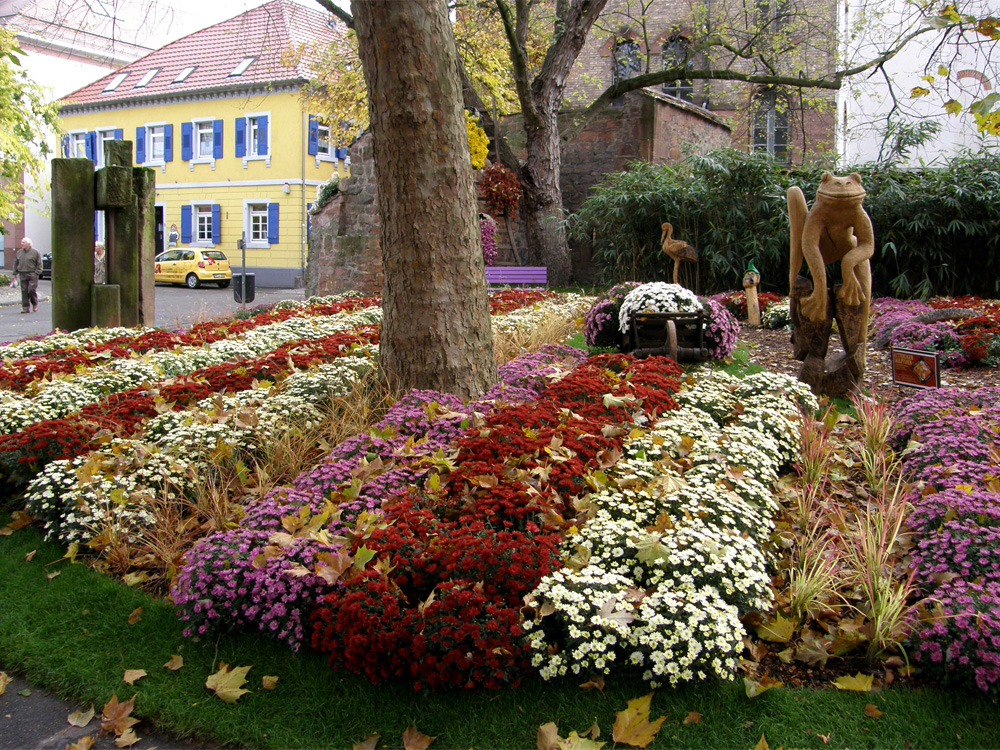 Parterre fleuri